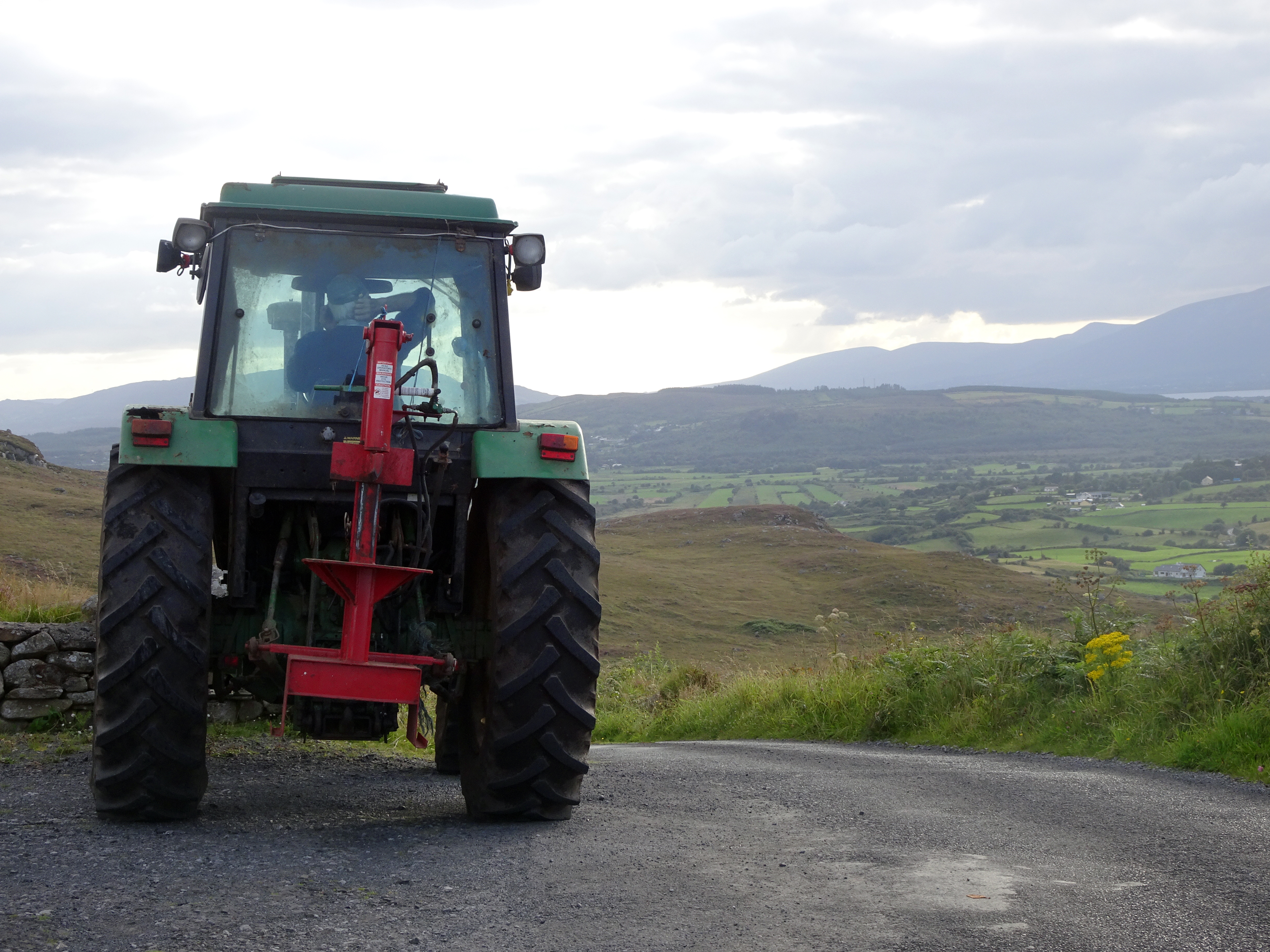 Un agriculteur venu au sommet d'une colline pour capter le réseau et téléphoner, dans le comté de Sligo en République d'Irlande